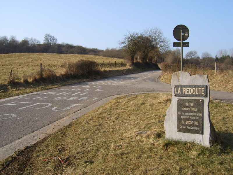 La Redoute in Sougné-Remouchamps